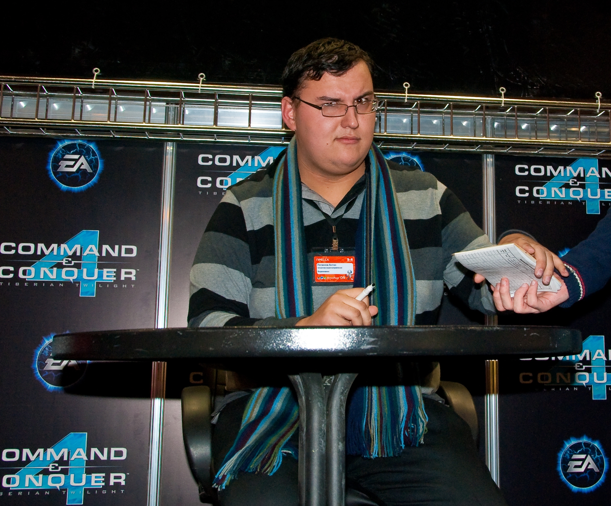 Антон Логвинов на выставке «ИгроМир-2009»